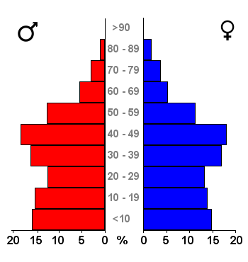 Age pyramids for the 443 municipalities in the Netherlands. Data 2007. Statistics provided by Centraal Bureau voor de Statistiek, Voorburg/Heerlen. Source: Tabel: Bevolking Nederland per gemeente en diverse regio's naar leeftijd, geslacht en burgerlijke staat, 1 januari 1988-2007. Gewijzigd op 24 mei 2007 (on-line database StatLine) Bevolkingspiramide - Gemeente Almere (2007).png